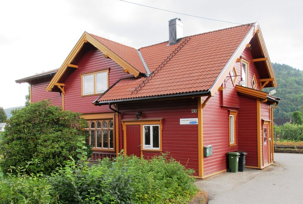 Mosby stasjon på Sørlandsbanen